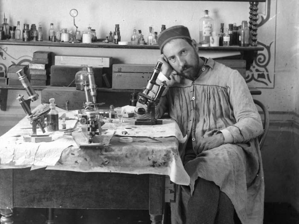 Ramón y Cajal en Valencia, 1884-1887. De su serie de autorretratos fotográficos.